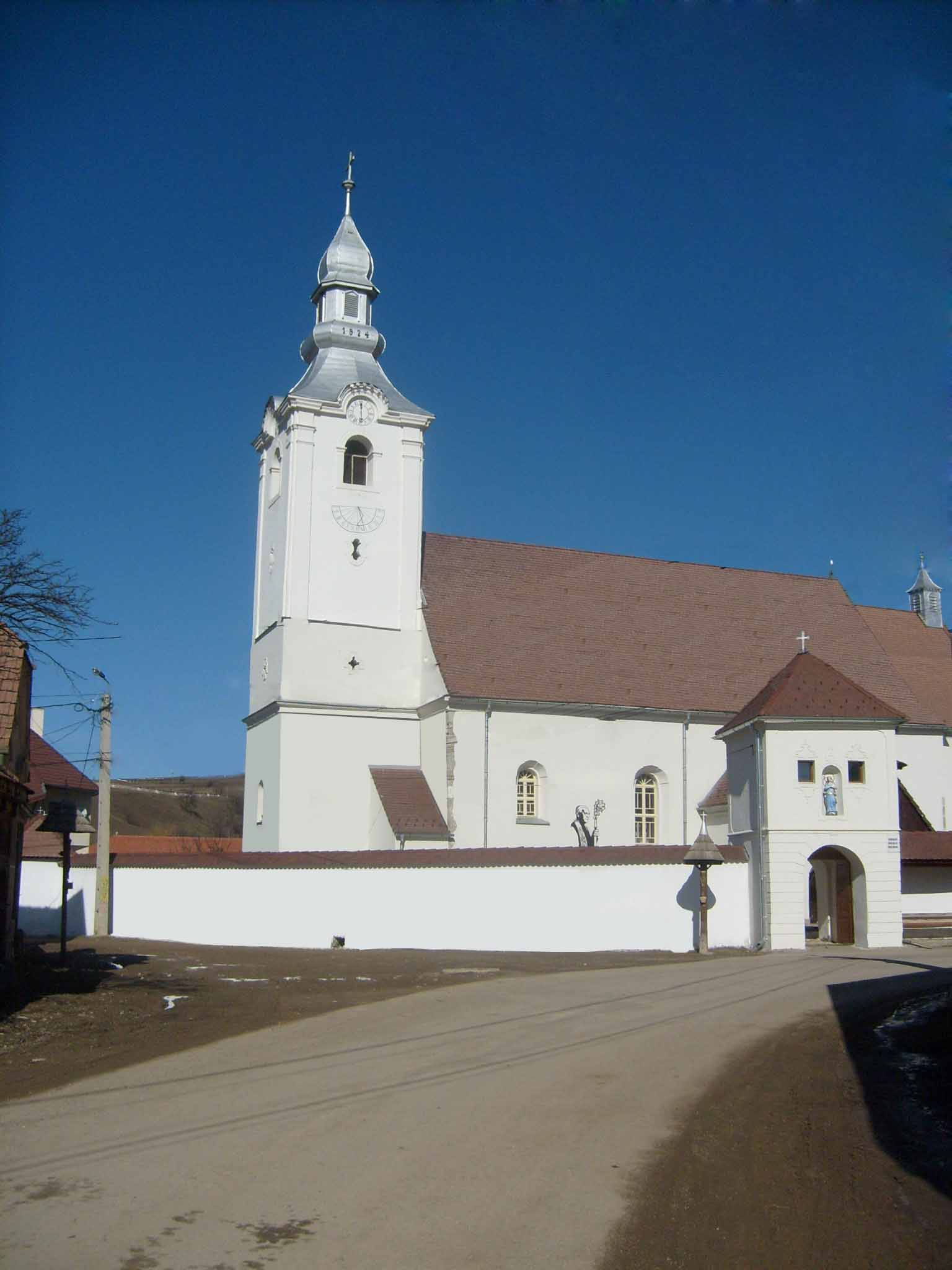 Csíkszentdomokosi római katolikus templom, Hargita megye, Románia